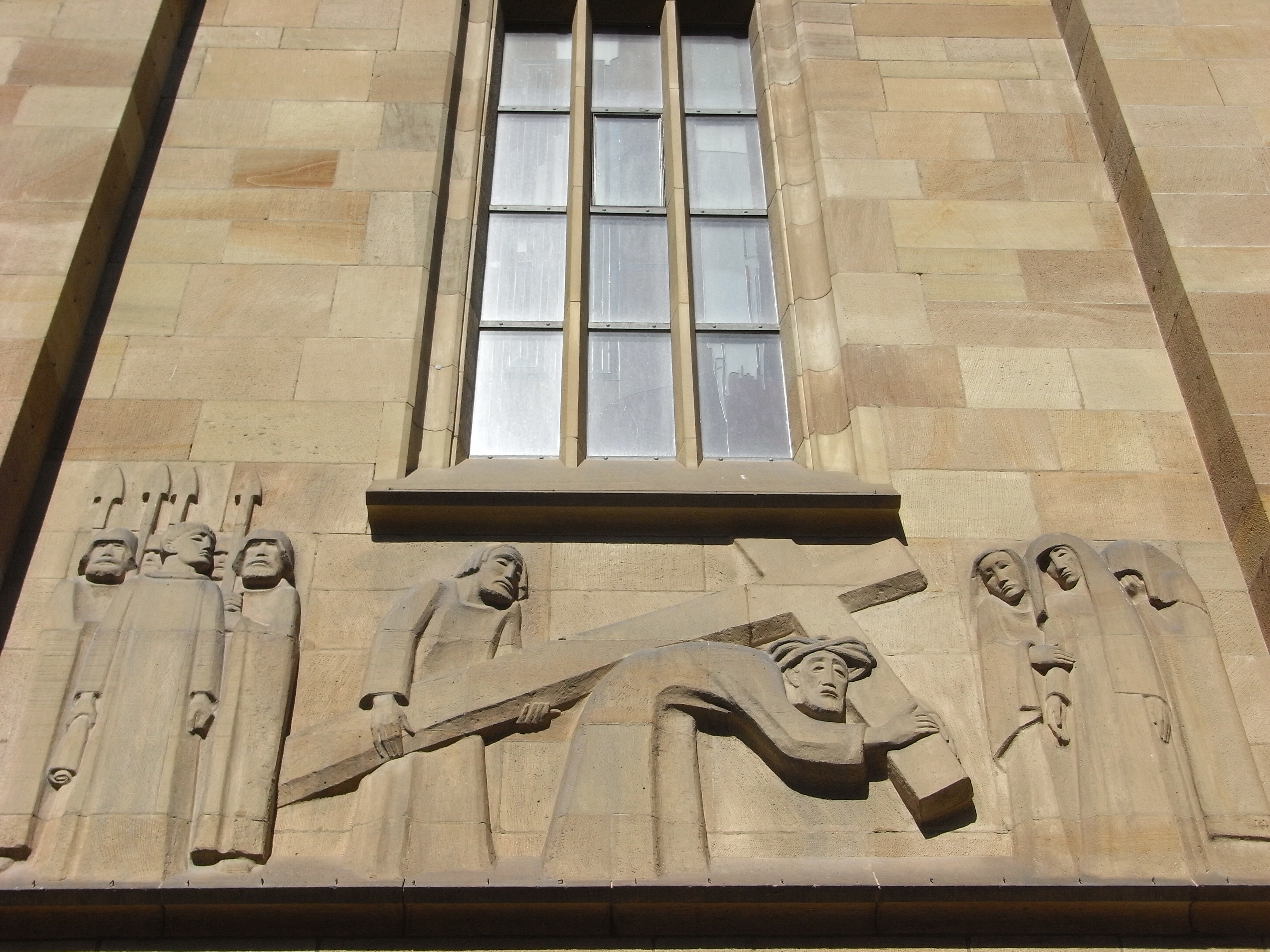 Stuttgart, Stiftstraße 12, Figuren an der Evangelischen Stiftskirche, Südwestpforte, Relief „Kreuztragung Christi“ von Karl Hemmeter, 1956.